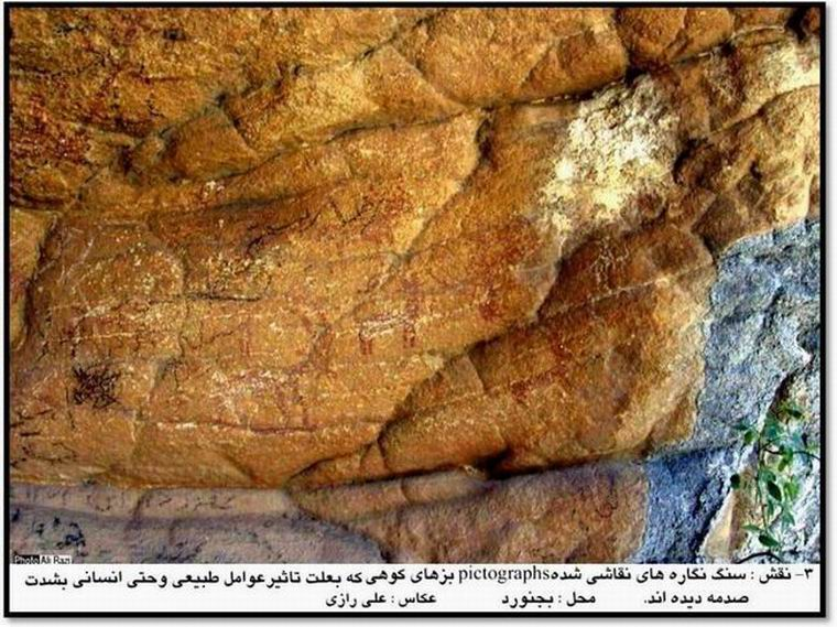 bojnord petroglyphs , iran